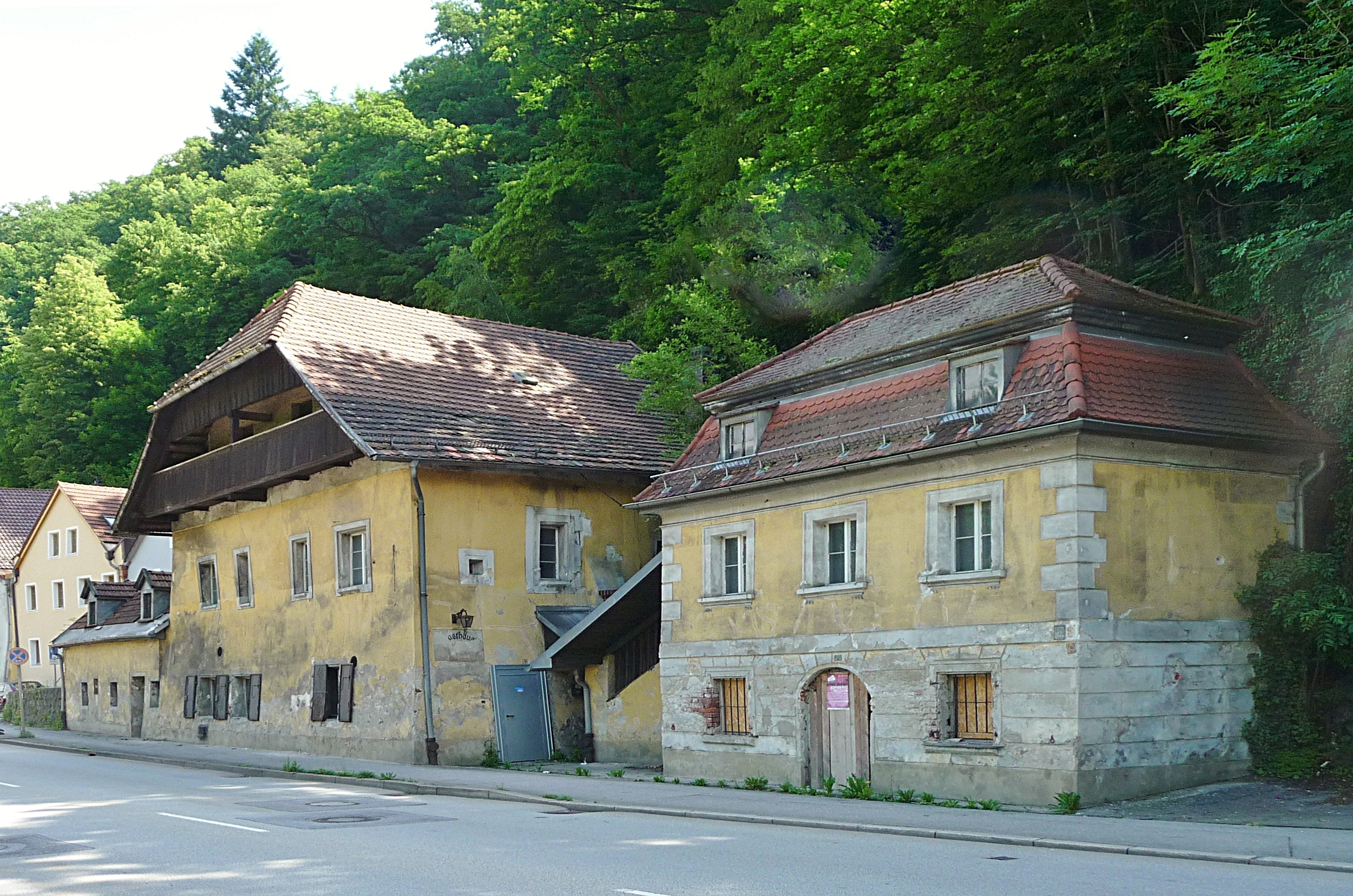 Das denkmalgeschützte Gebäude Freyunger Straße 14 in Passau